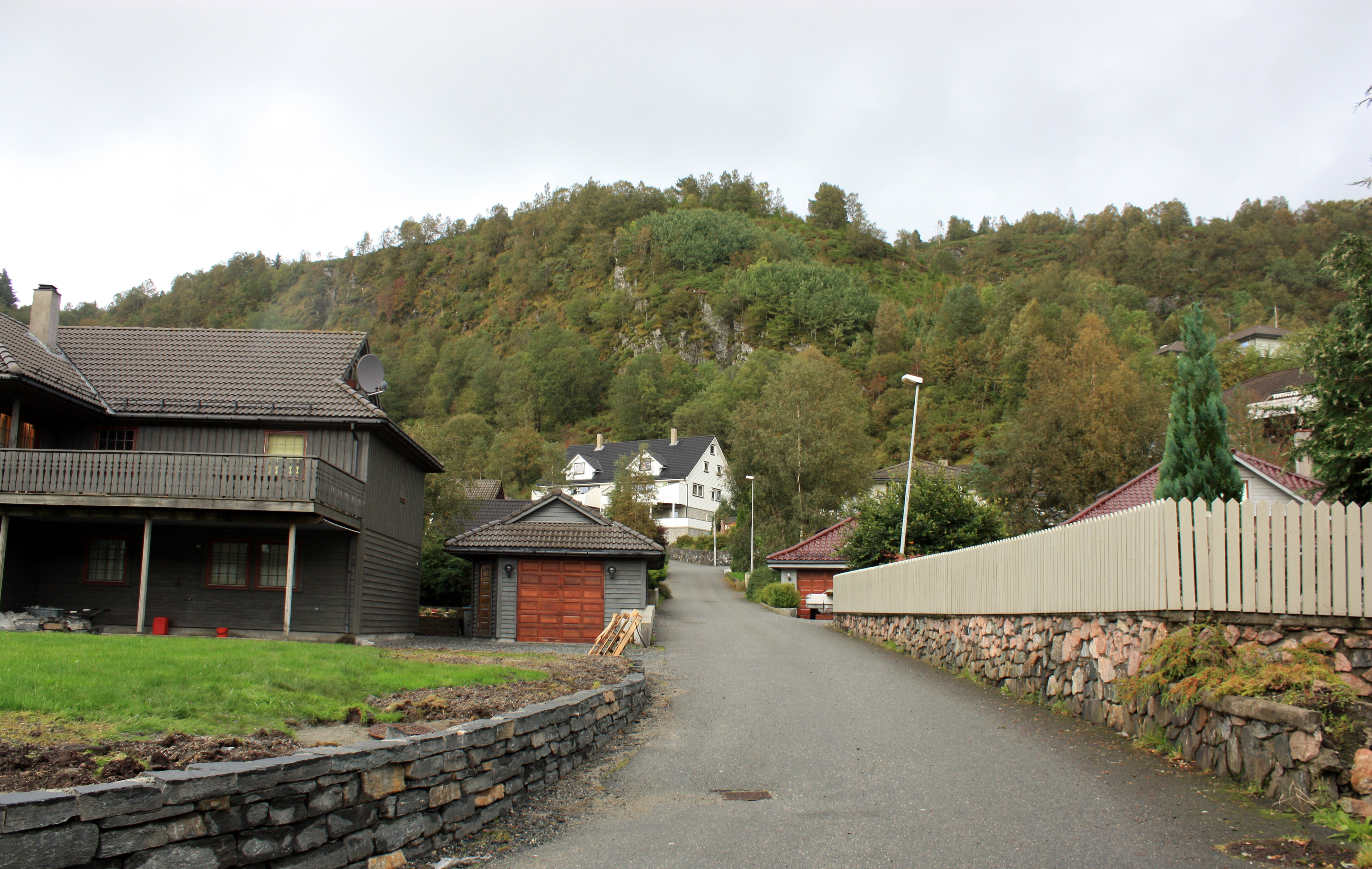 Vallaskaret, Fana, Bergen.